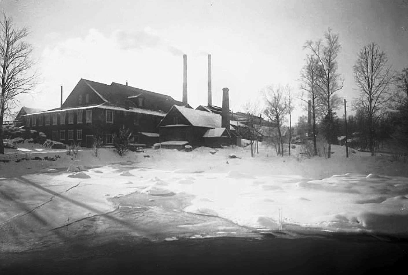 Foto från glasbruket i Orrefors.